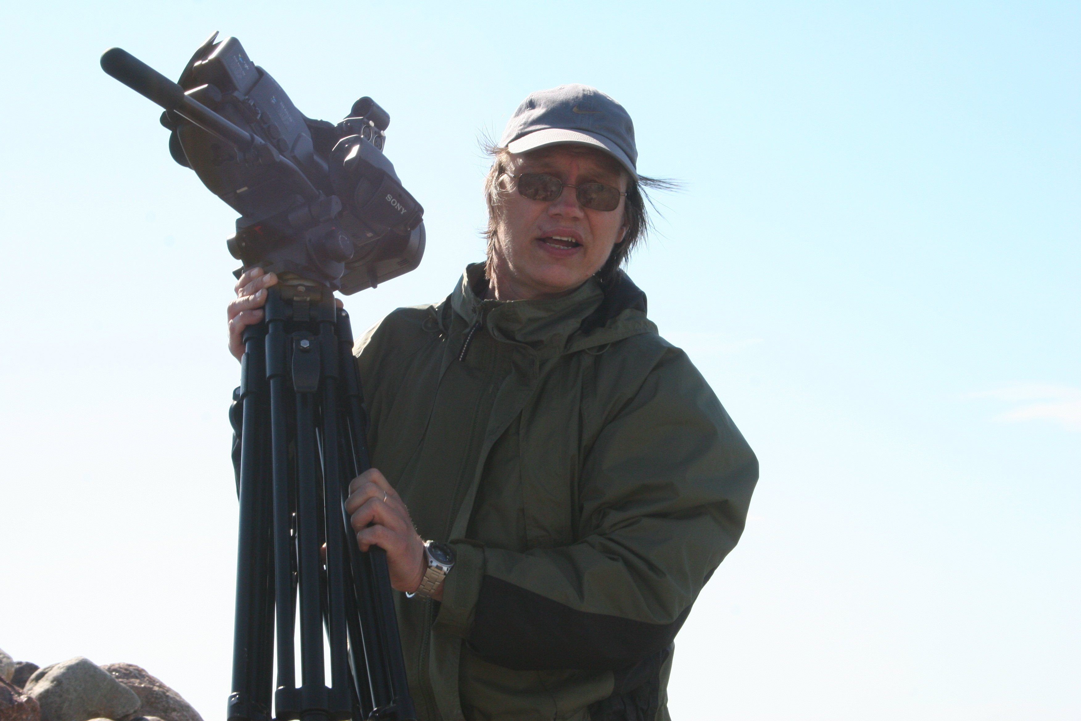 Režissöör Jaan Kolberg